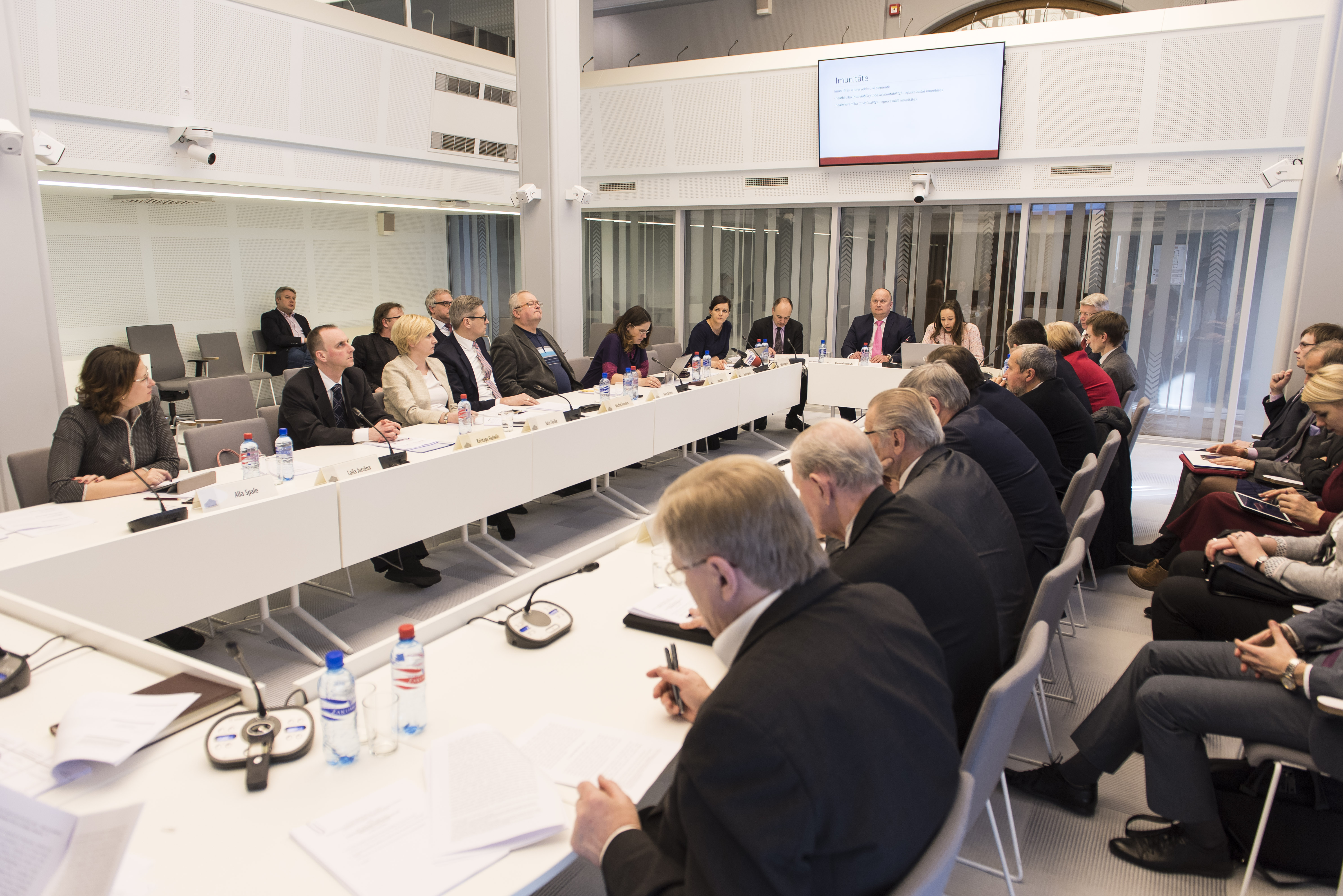 Foto: Ernests Dinka, Saeimas administrācija